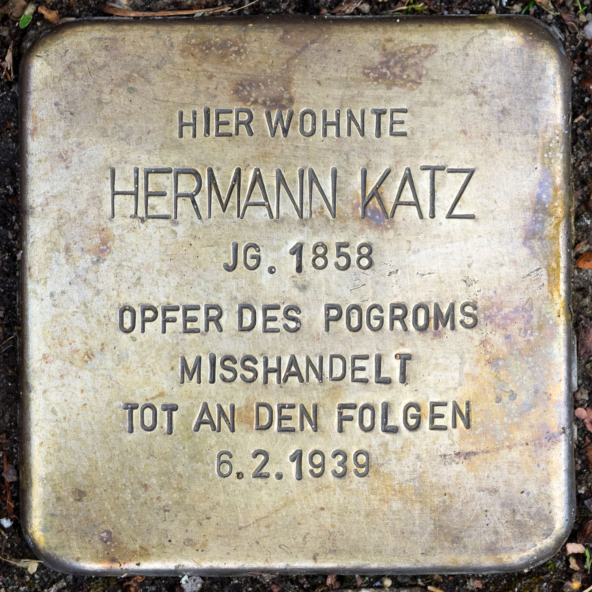 2016 Stolpersteine ToeVo Katz Hermann